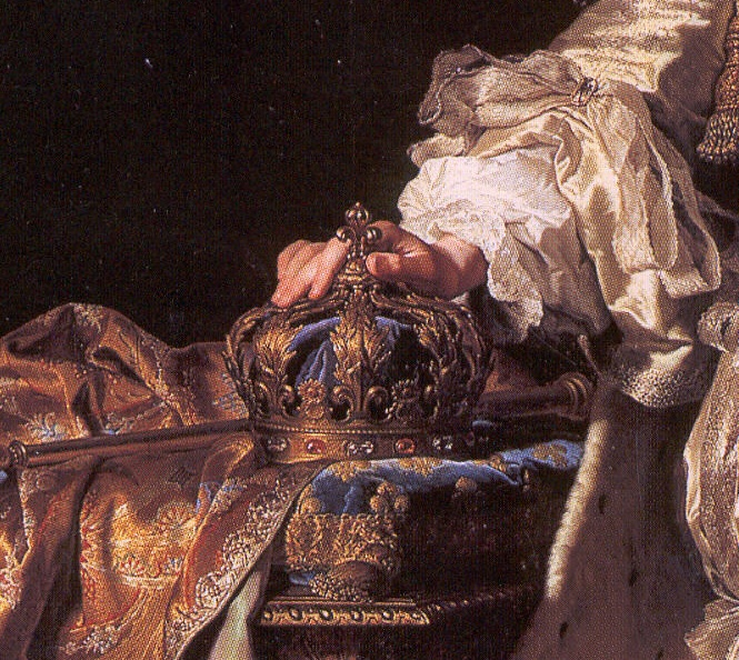 Detail portret Lodewijk XV door Hyacinthe Rigaud.